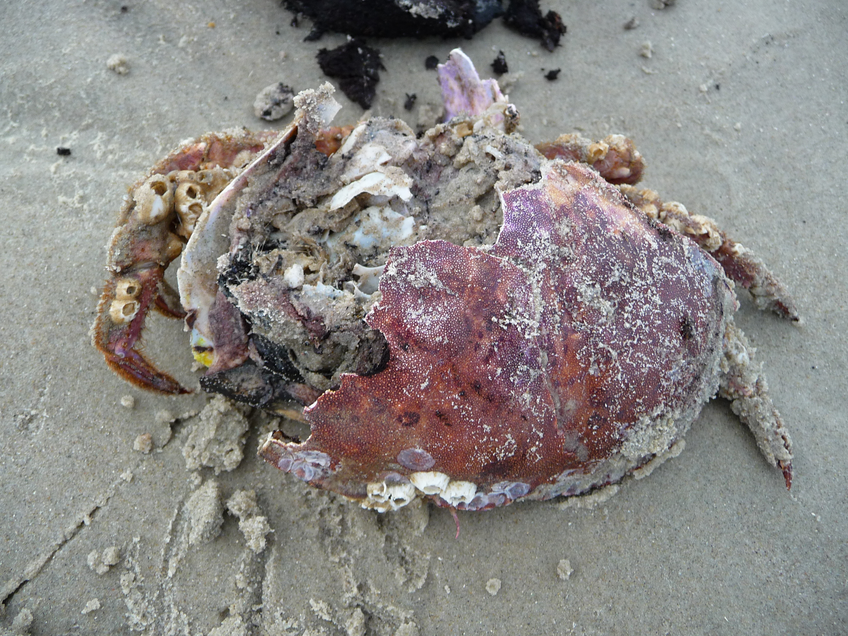 Überreste eines Taschenkrebses (Cancer pagurus), fotografiert im Spülsaum auf der ostfriesischen Nordseeinsel Juist (Niedersachsen, Deutschland)